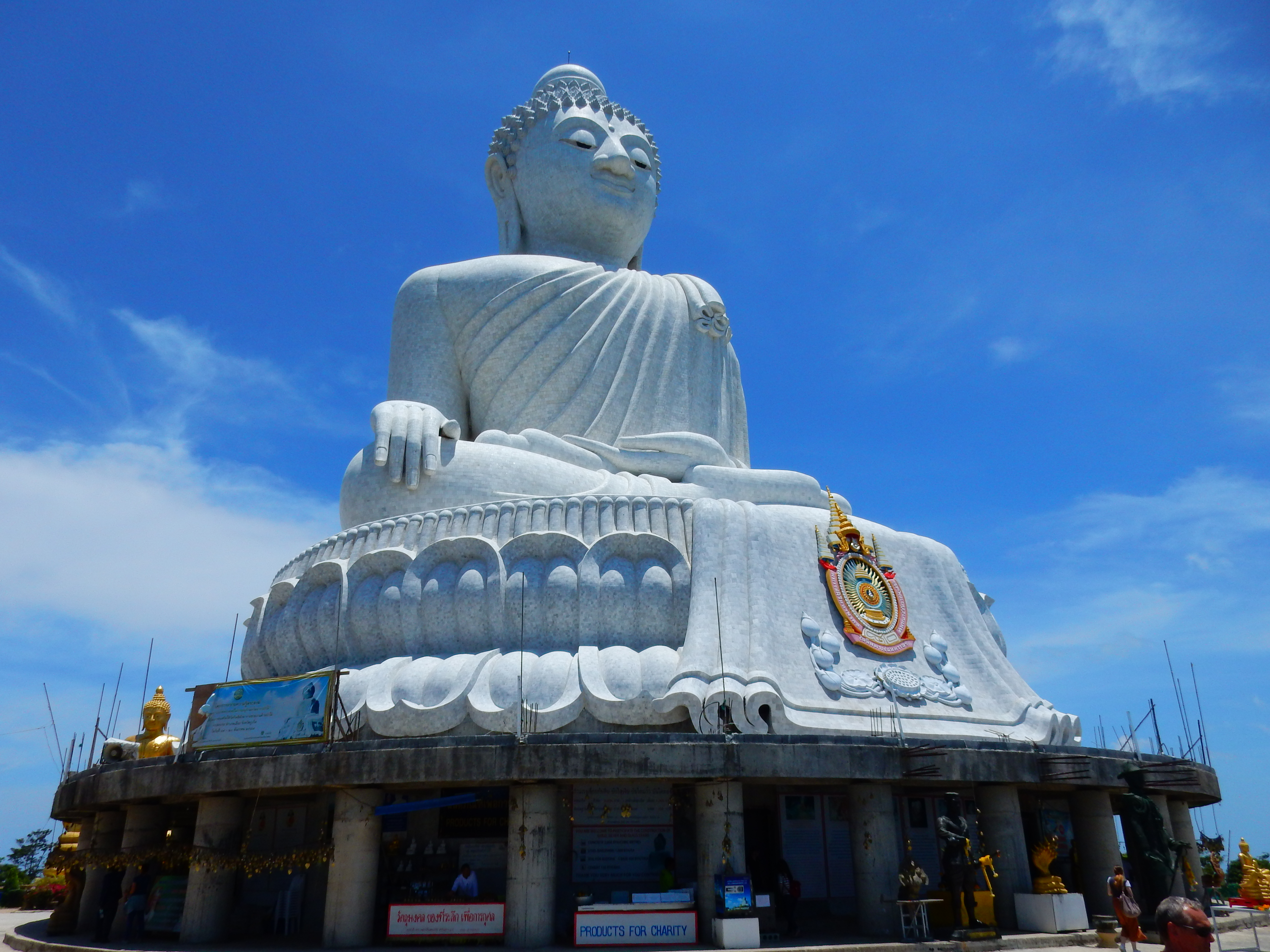 Phuket 2015 april